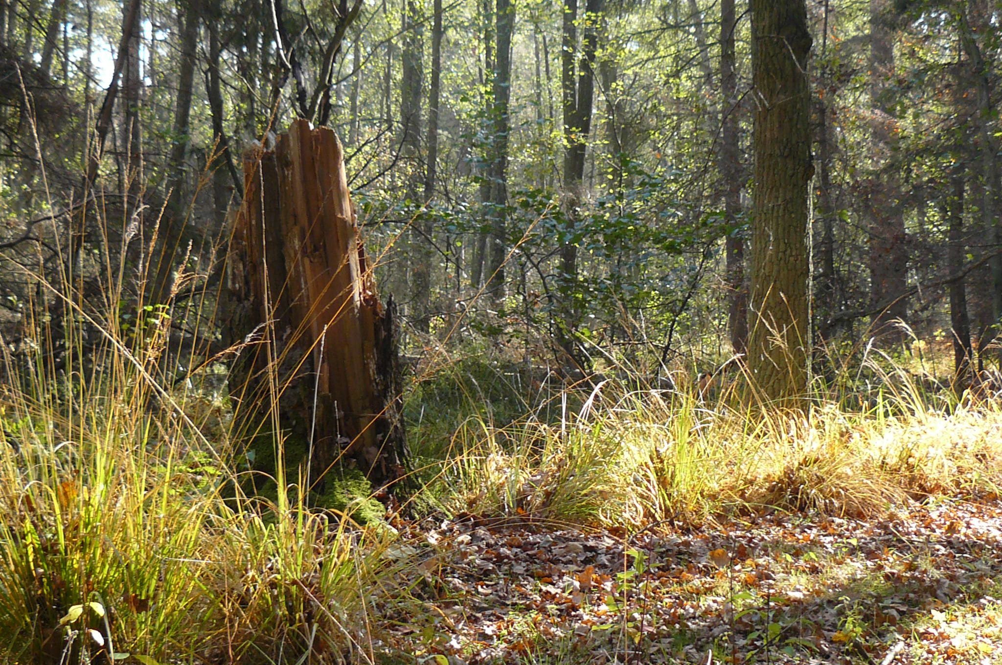 Rezerwat przyrody Baszków - Obszar Chronionego Krajobrazu Dąbrowy Krotoszyńskie i Baszków-Rochy (okolice Baszkowa).